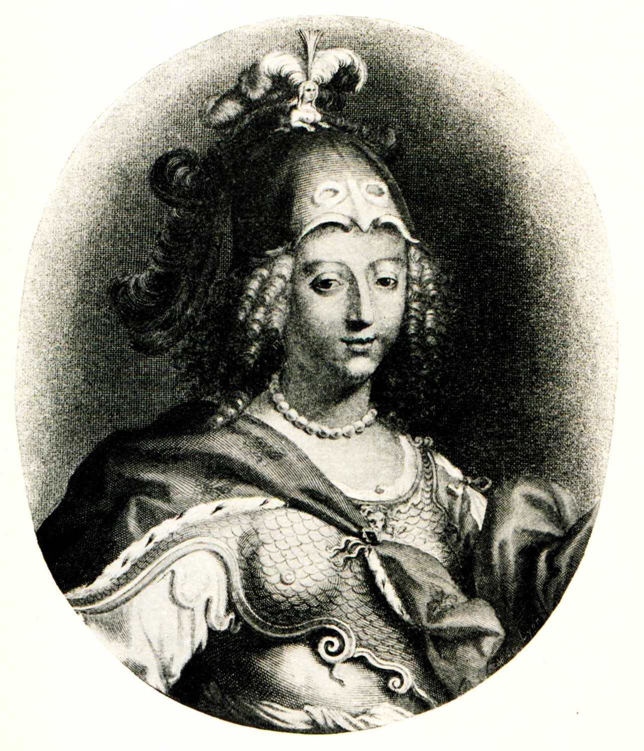 Extrait de P. Lenail, Le Parlement des Dombes, 1900. ADRML